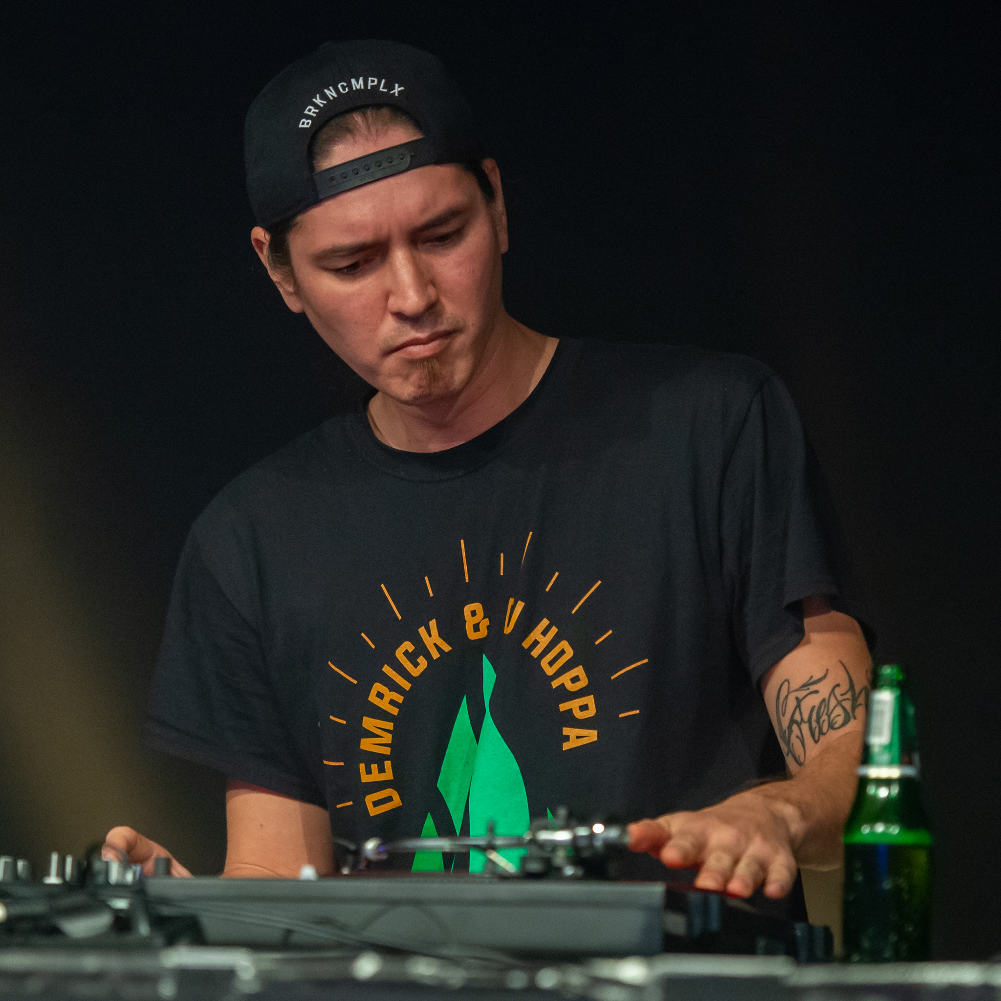 Concertbüro Franken,DJ Hoppa,Lee Gresh,Livekonzert,Livemusik,Löwensaal